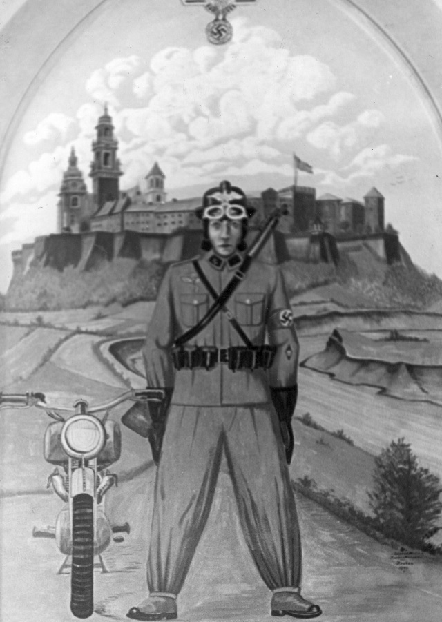 Obraz z kwatery NSKK w Krakowie ze zbiorów Narodowego archiwum cyfrowego